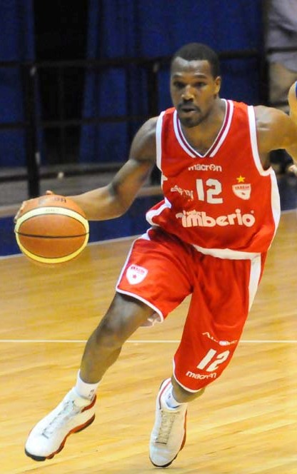 Mike Green